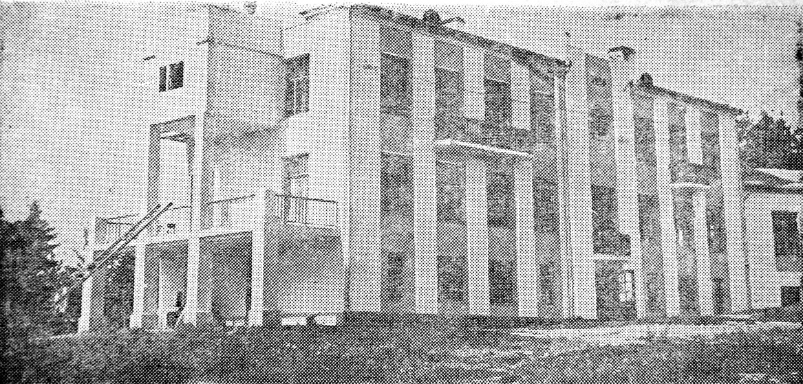 Беларуская (тарашкевіца): Менск (Miensk), Ждановічы (Ždanovičy). Дом адпачынку